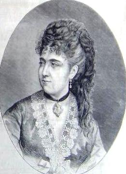 Amalia Fossa (1852-1911)